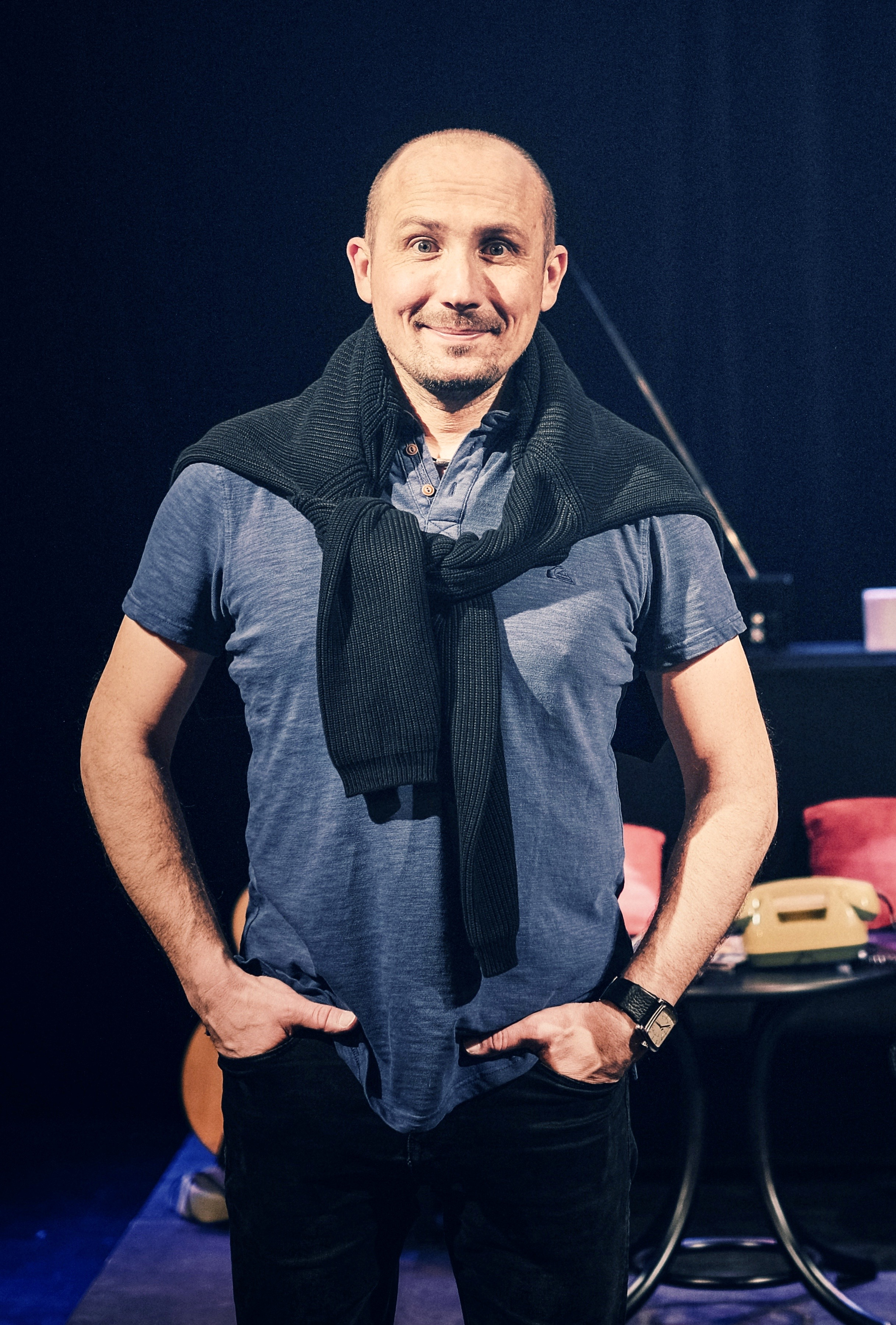 Jiří Krhut / Varieté